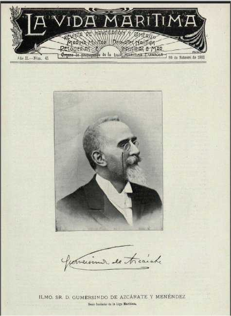 Gumersindo de Azcarate (1840-1917) foto e autografo nella copertina de "La Vida Maritima del 20.2.1903